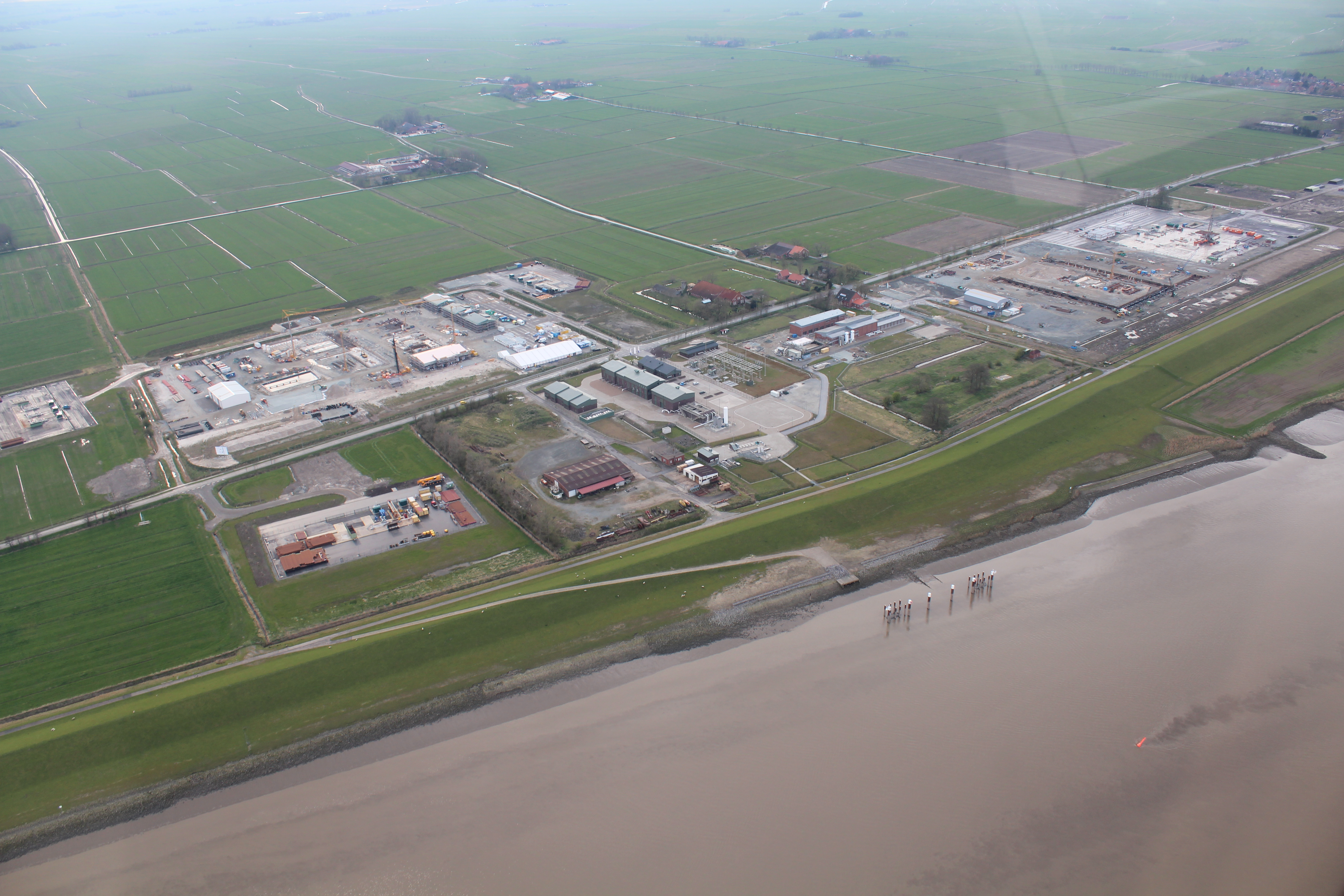 Gaskavernenbaustelle in Jemgum an der Ems